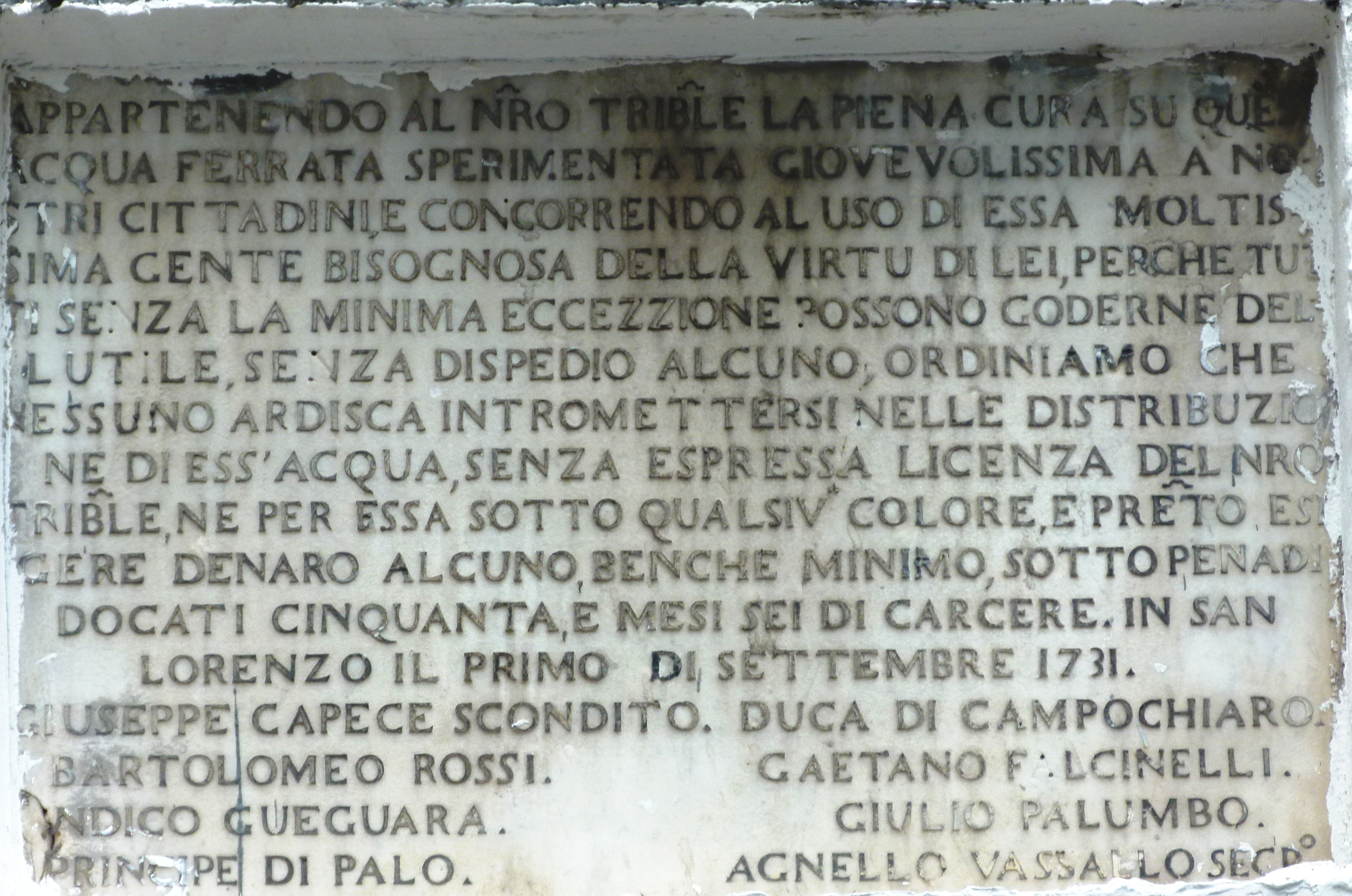 Fonte di acqua ferrata, via Chiatamone Napoli. Targa di Editto del 1731